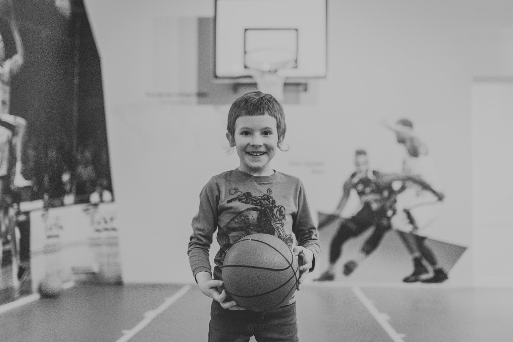 Elamusnäitus "Kõik mängu!"